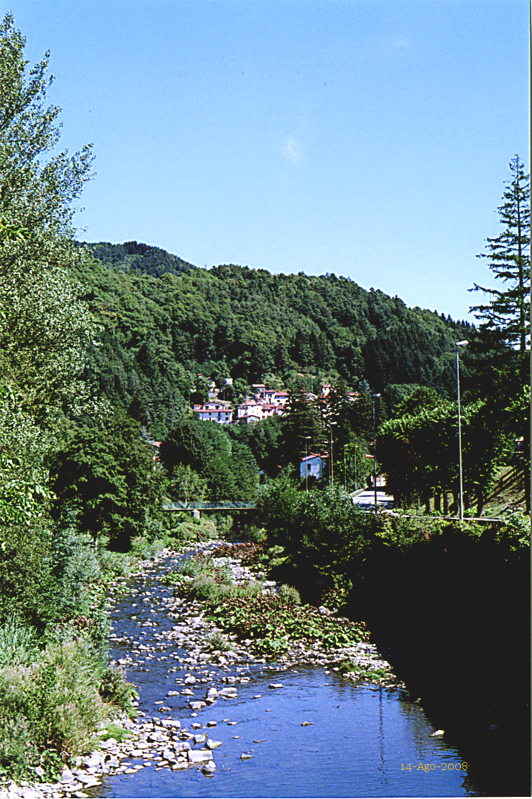 Ritrae la località Pracchia nel comune di Pistoia. Foto scattata il 14 agosto 2008 con clone Pentax reflex manuale, 50 mm focale fissa e pellicola a 800 ISO. Sono io l'autore.